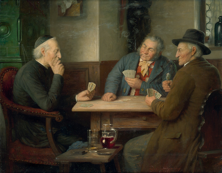 Die Skatpartie. Öl auf Leinwand. 55 x 70 cm. Am unteren Rand signiert "Wagner Höhenberg".